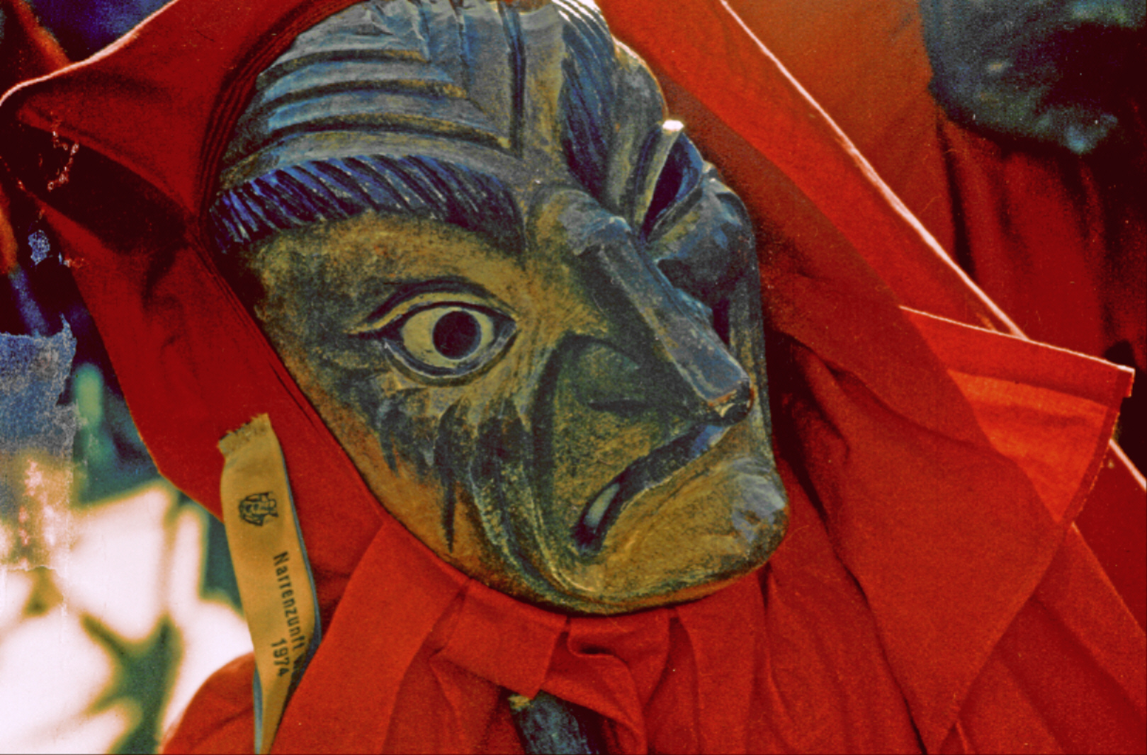 Schrättele der Narrenzunft Bad Waldsee beim Narrentreffen Riedlingen 1974